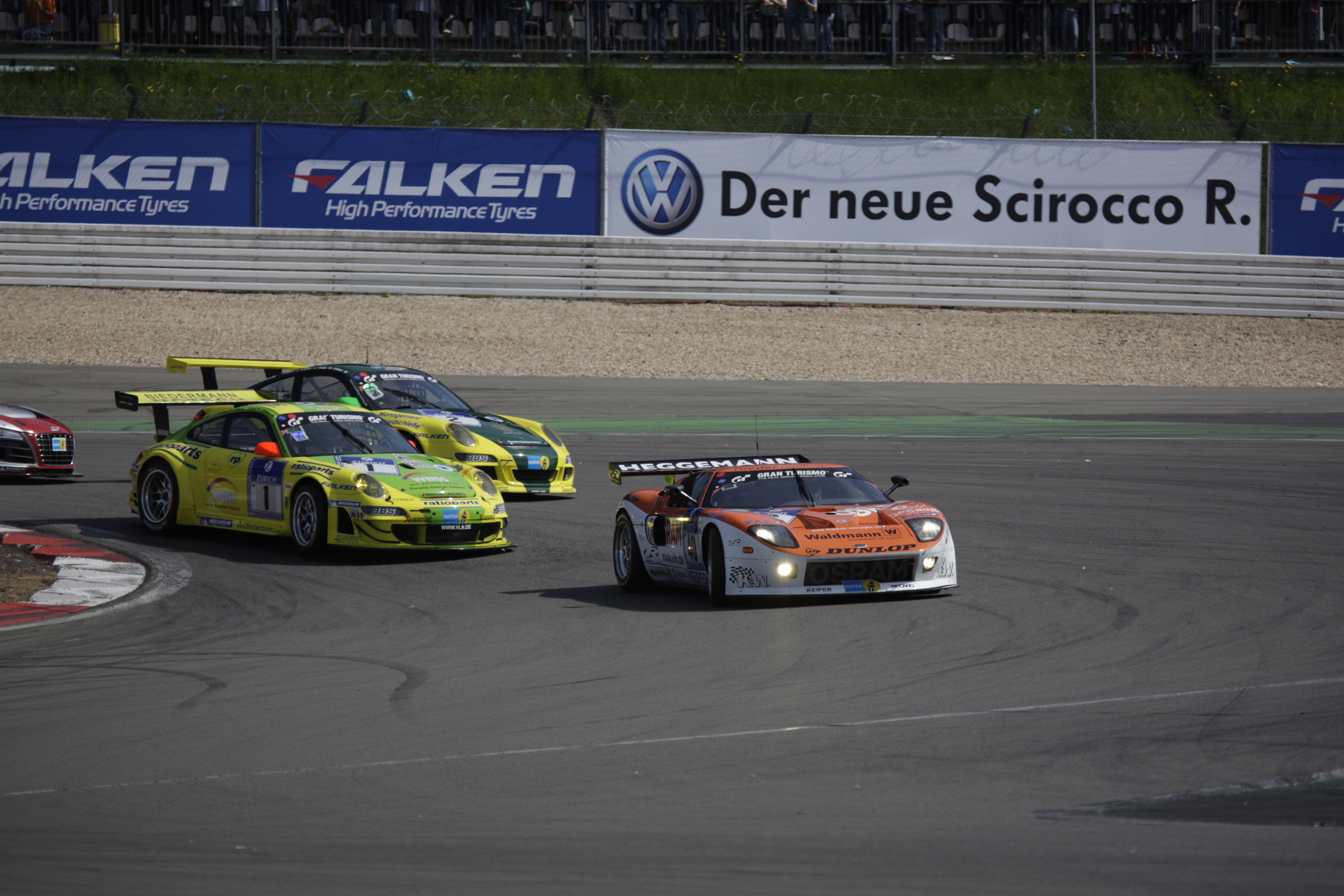 Ford GT gefahren von Dirk Adorf, gefolgt von Marc Lieb im Porsche 997 beim 24-Stunden-Rennen auf dem Nürburgring 2009 in der ersten Kurve.